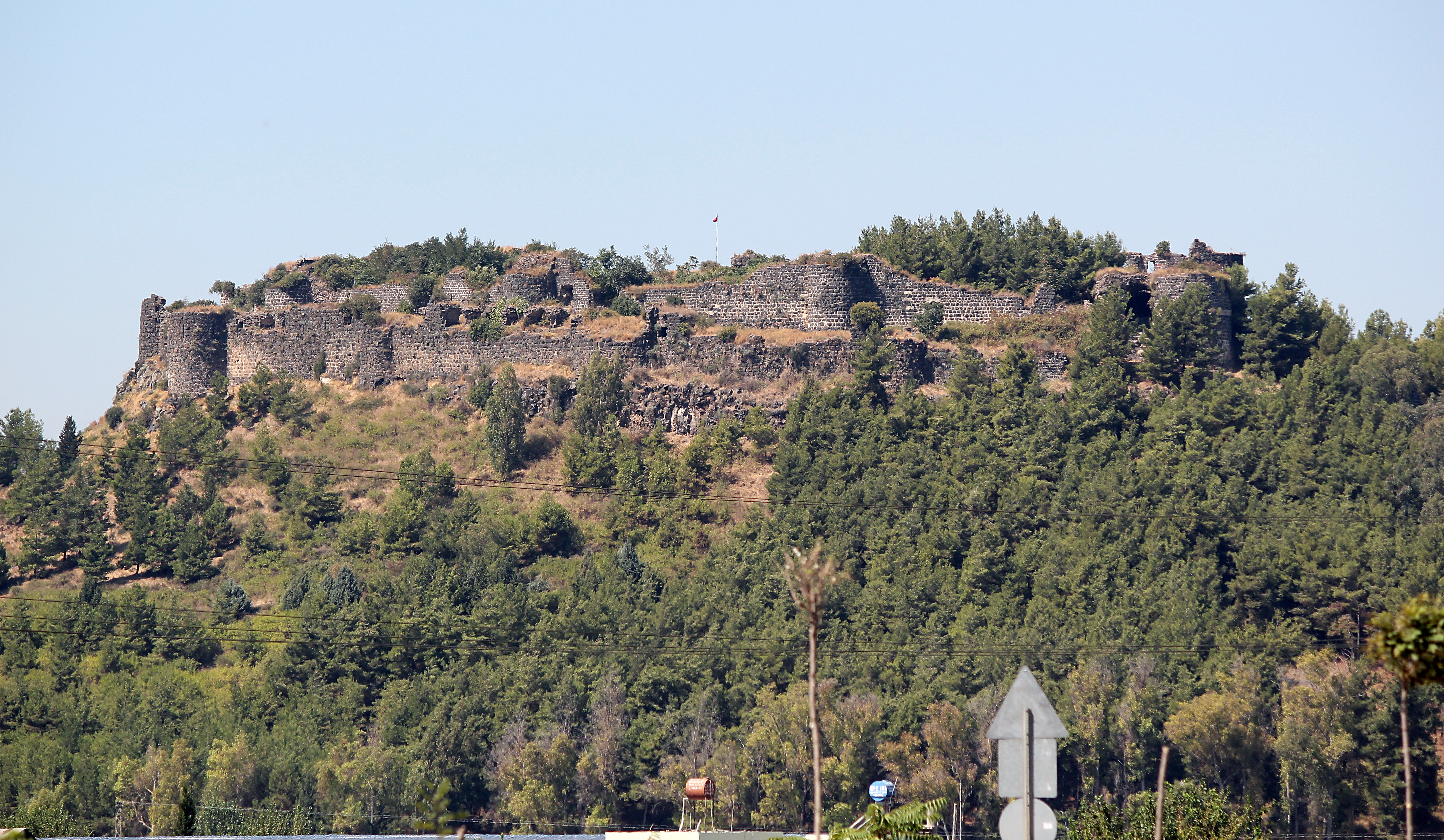 Toprakkale, Kreuzritterburg beim gleichnamigen Ort nahe Osmaniye, Südtürkei